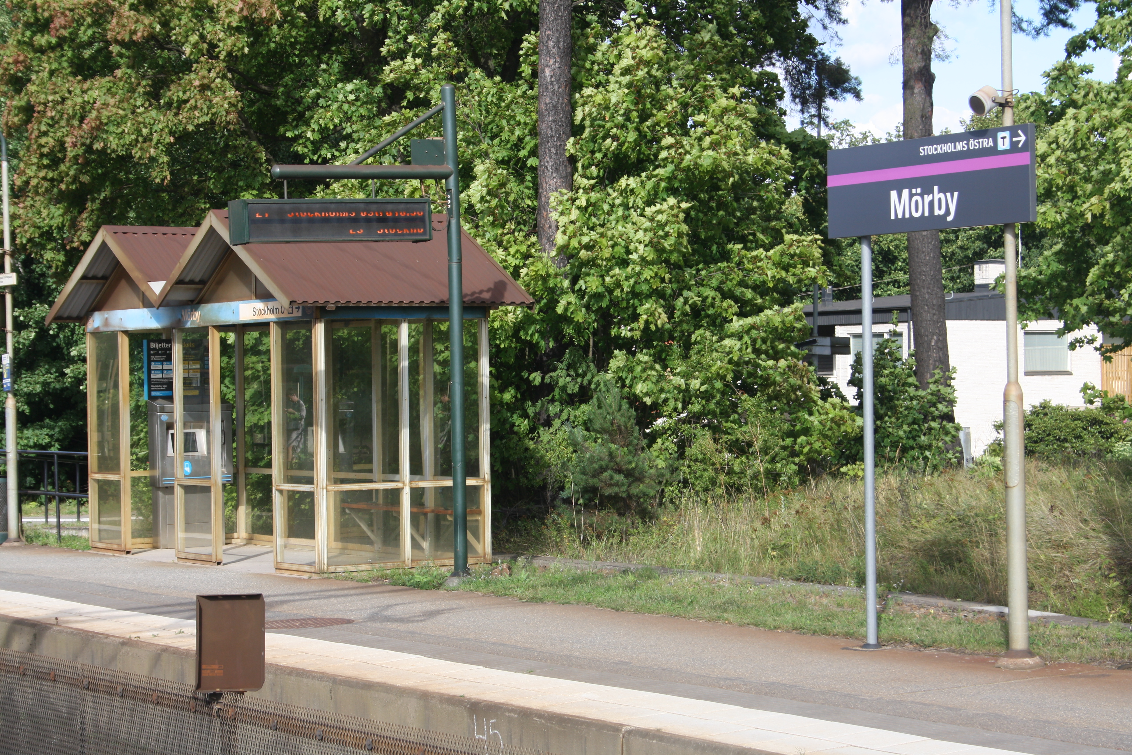 Mörby station